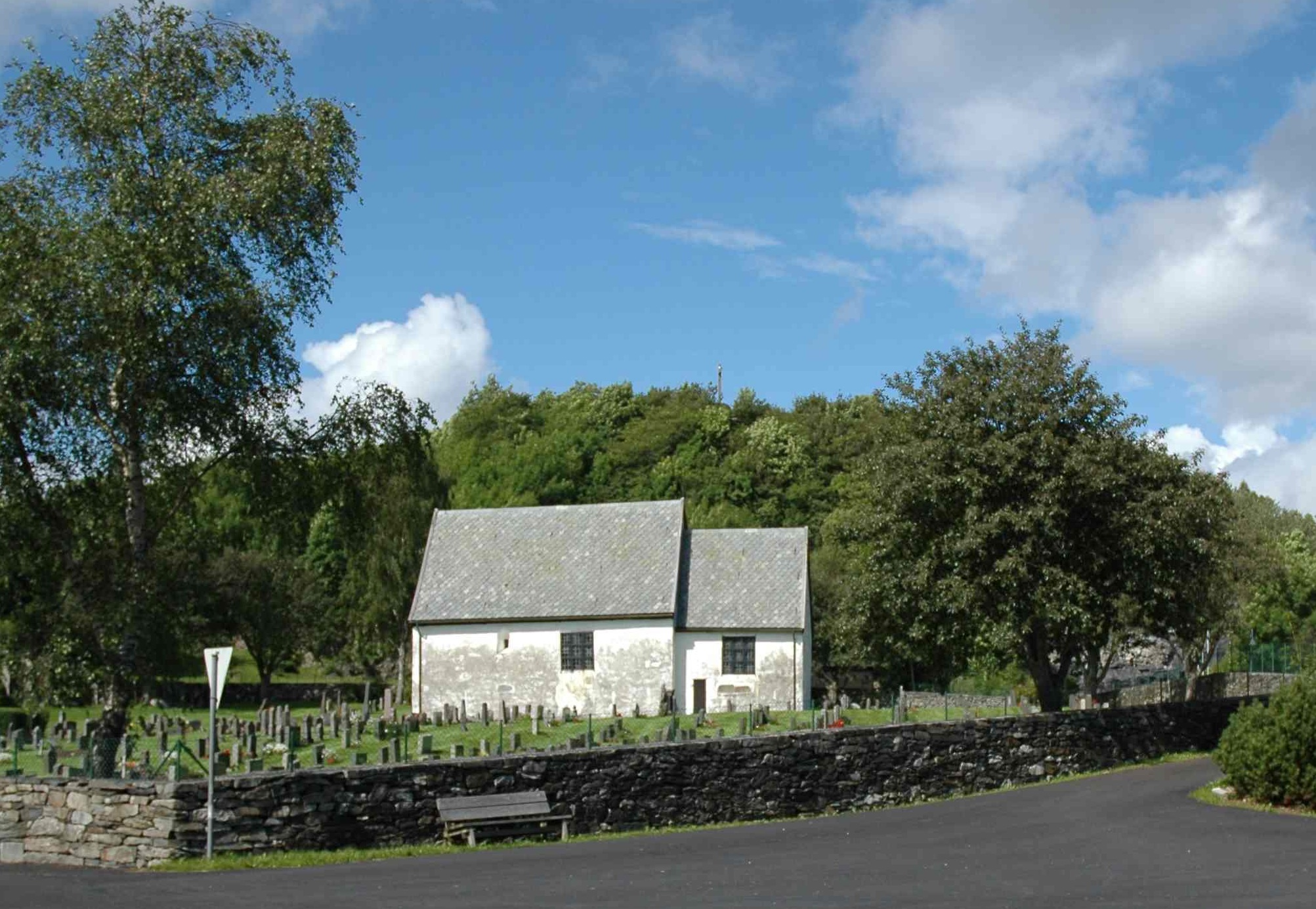 Norsk (nynorsk): Moster gamle kyrkje